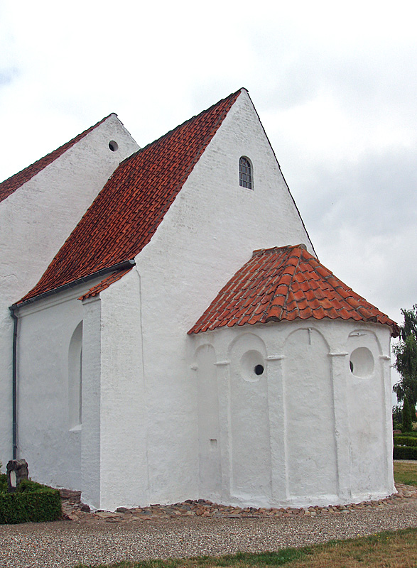 Apsis Skanderup Kirke , Skanderborg, Hjelmslev Herred, .Århus Amt (tidligere Skanderborg Amt)